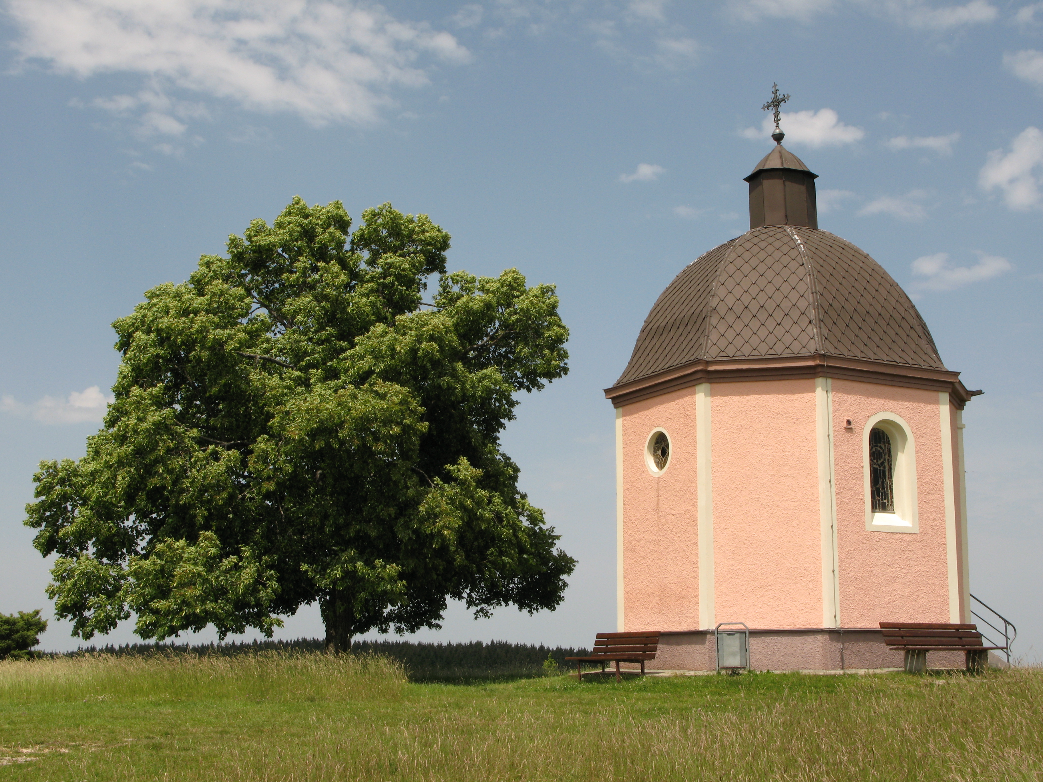 Kapelle auf dem Alter Berg bei Böttingen am Donauberglandweg auf der Schwäbischen Alb.